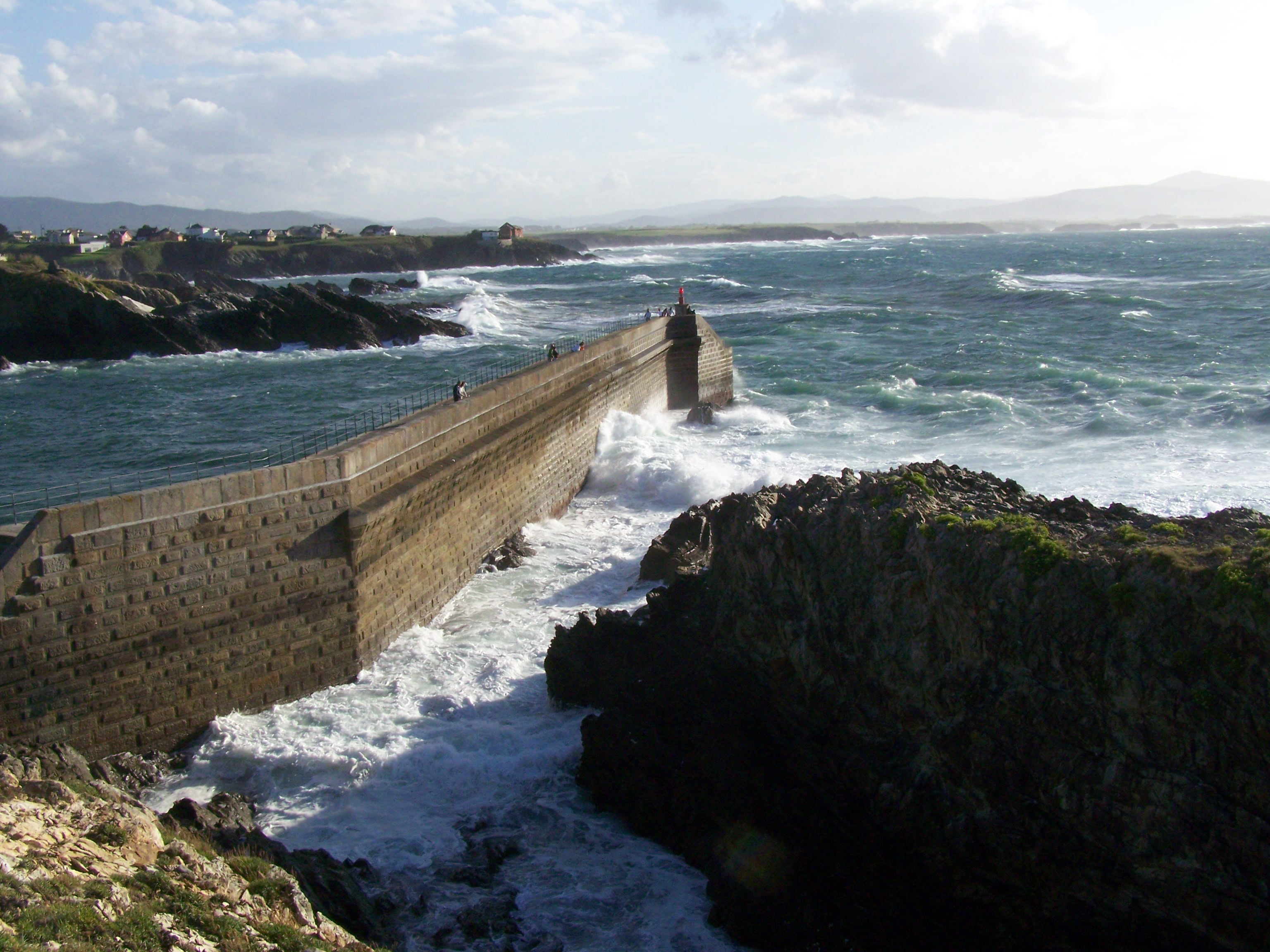 Tapia